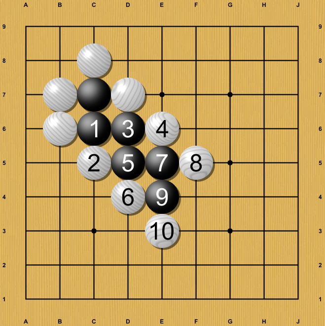 Escalera en el Go